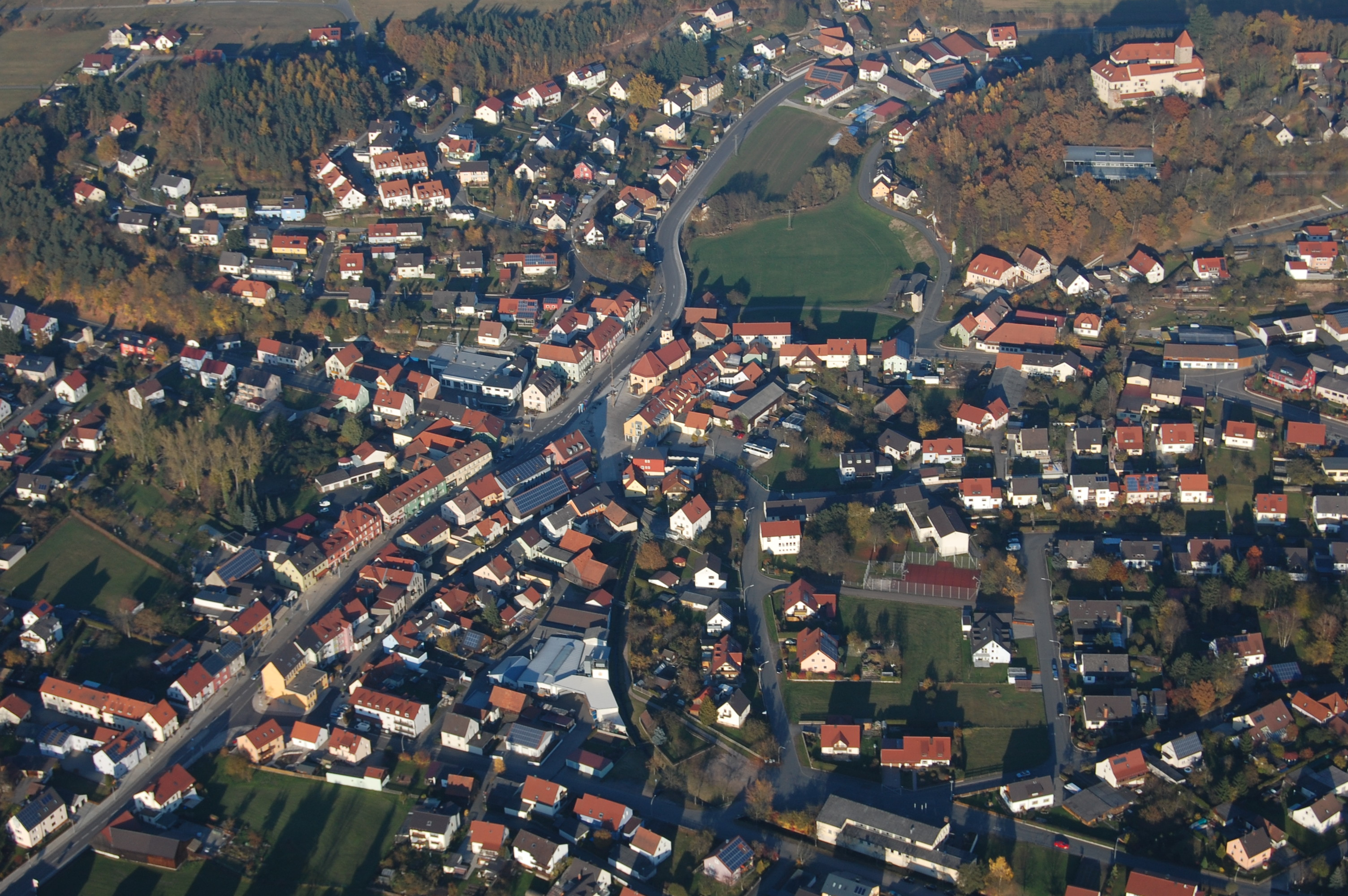 Ortskern von Wernberg-Köblitz (2010)